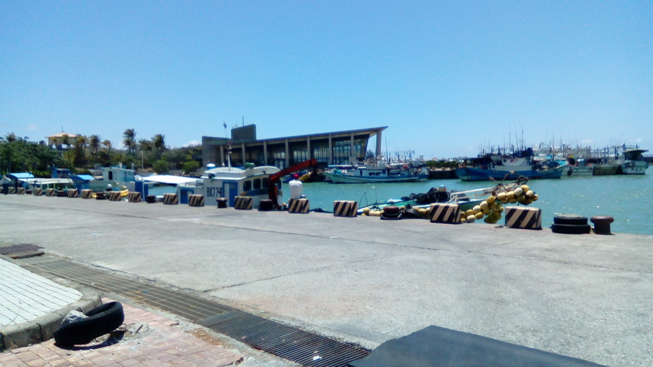 位於車城鄉海口村 屏鵝公路和車城濱海景觀道路口